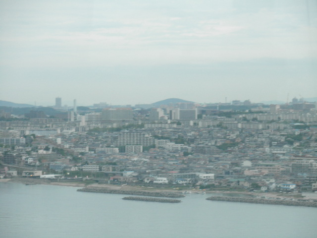 兵庫県神戸市垂水区舞子 遠景